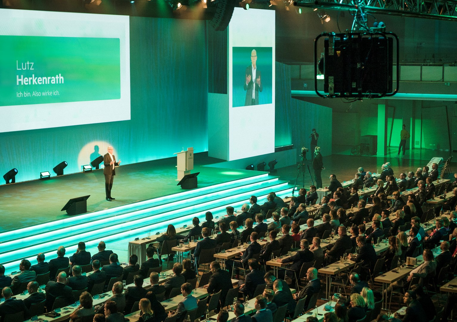 Lutz Herkenrath